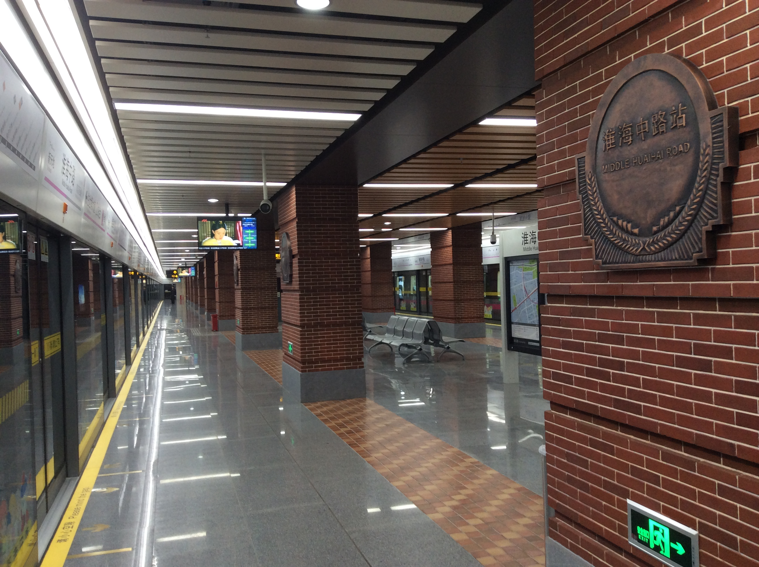 中文（中国大陆）: 20151219上海地铁淮海中路站站台